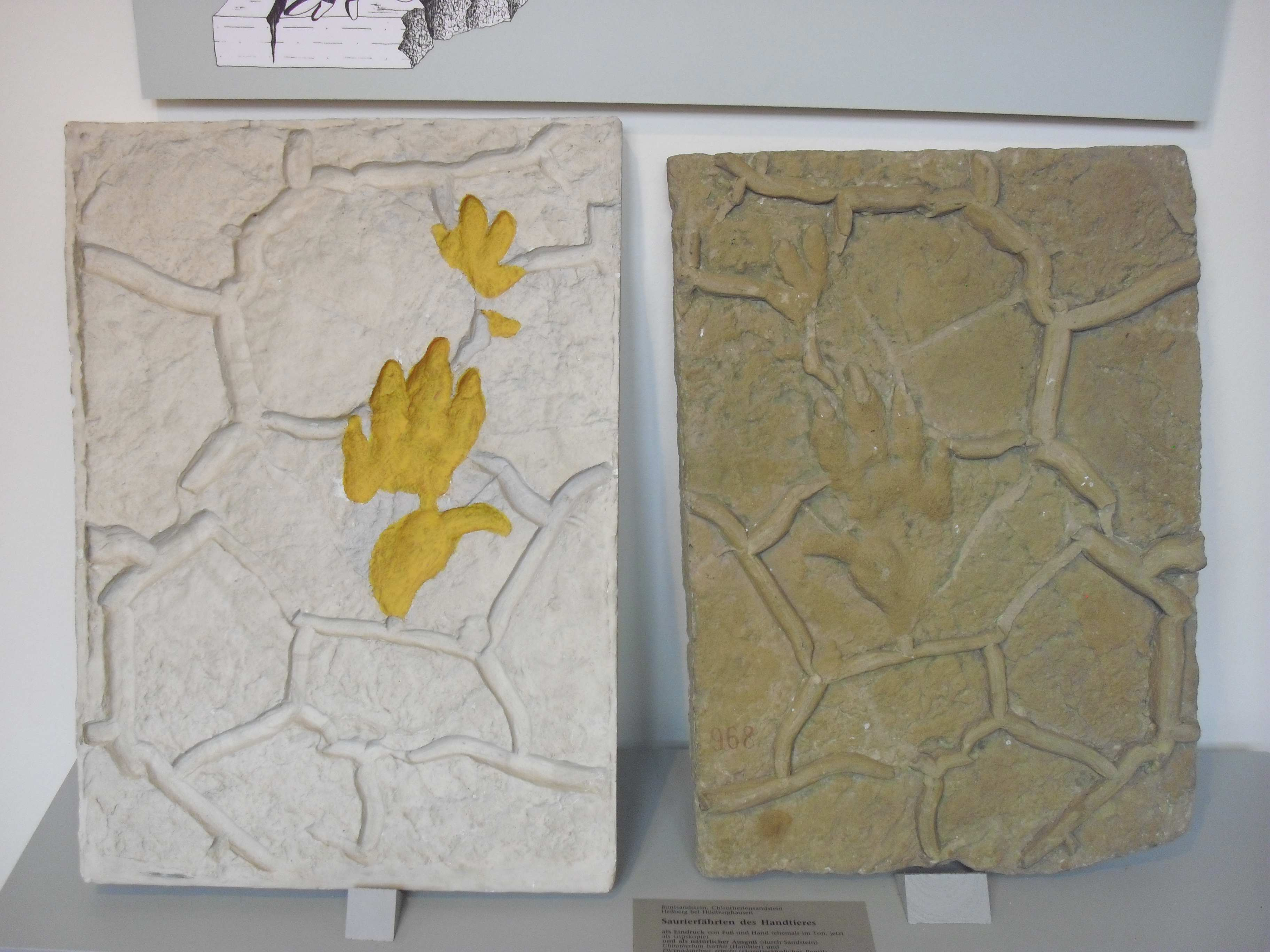 Die Fährte des Handtieres im Naturhistorischen Museum Schleusingen